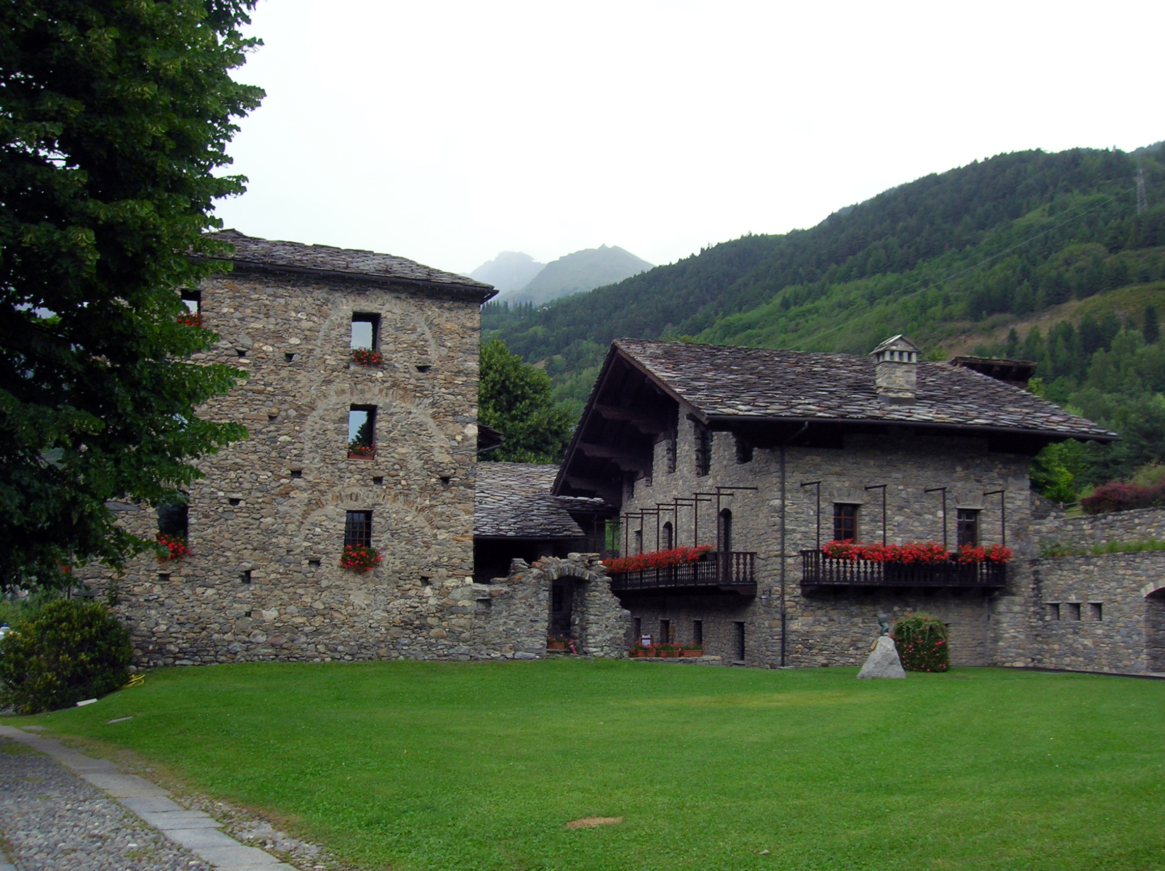 Maison Gerbollier, La Salle, Valle d'Aosta, Italia.